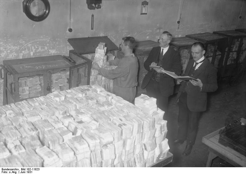 Banknoten werden vernichtet! Die Deutsche Reichsbank lässt von Zeit zu Zeit alte abgegriffene und beschädigte deutsche Banknoten einziehen und in ihrer Banknoten-Vernichtungsanstalt vernichten. Ehe das aus dem Verkehr gezogene Papiergeld zur Vernichtungsstelle gelangt, wird es von Beamten der Reichsbank genau registriert und dann in die Zerschneidemaschine geworfen. Die vernichteten Banknoten werden zur Herstellung anderen Papiers weiter verwendet. Beamte der Deutschen Reichsbank bewachen die Entladung der zur Vernichtung bestimmten Banknoten in der Vernichtungsanstalt.